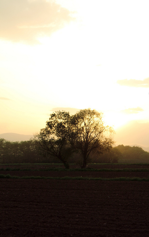 Vushtrria njihet si nje prej qytetëve te prodhimit te patates